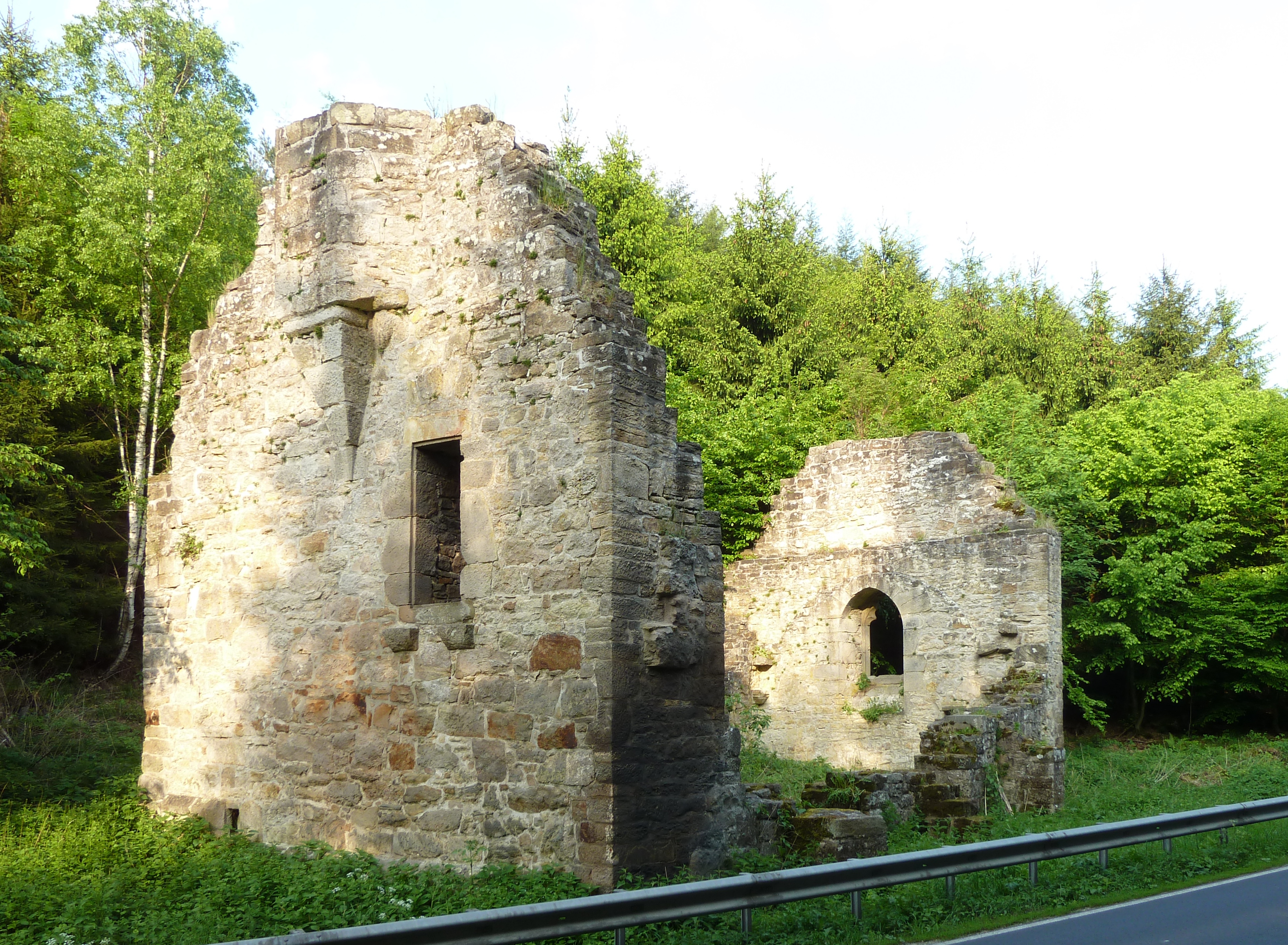 Ruine der spätgotischen Kapelle St. Maria der Wüstung Reynhardeshagen an der Landstraße 554 westlich von Adelebsen, Niedersachsen. Auch als „Alte Kirche Reinshagen“ bezeichnet. Schriftliche Ersterwähnung 1445